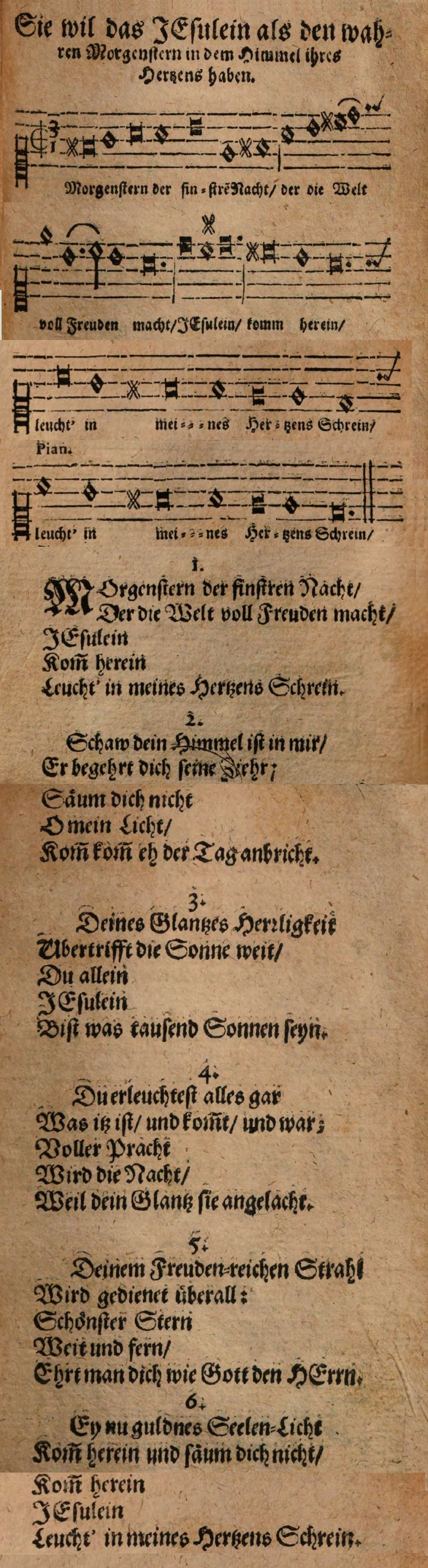 Angelus Silesius: Morgenstern der finstern Nacht, 1. Strophe mit Melodie von Georg Joseph, in: Heilige Seelen-Lust Oder geistliche Hirten-Lieder Der in ihren JESUM verliebten Psyche, Breslau 1657